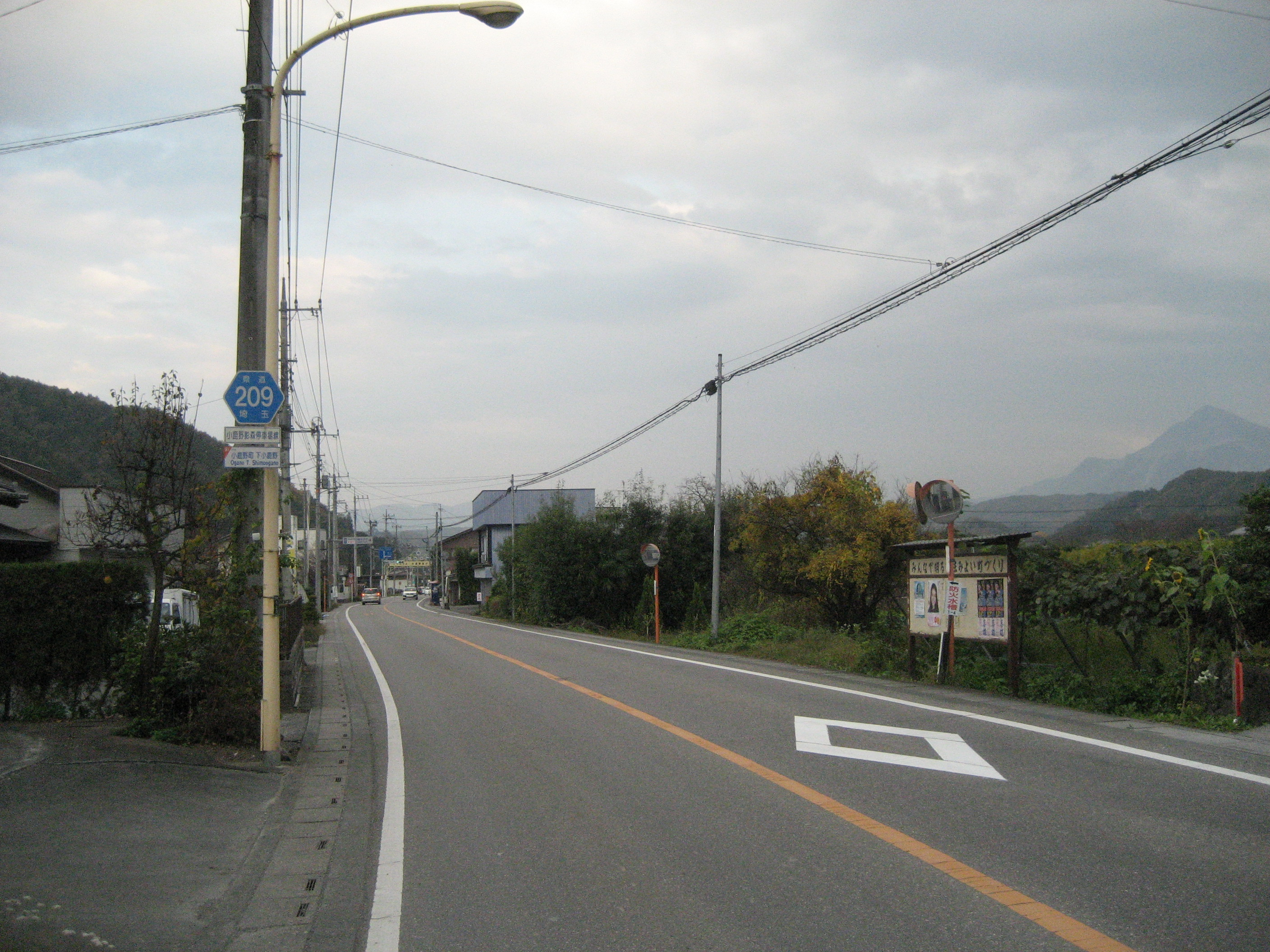 埼玉県道209号線小鹿野町内